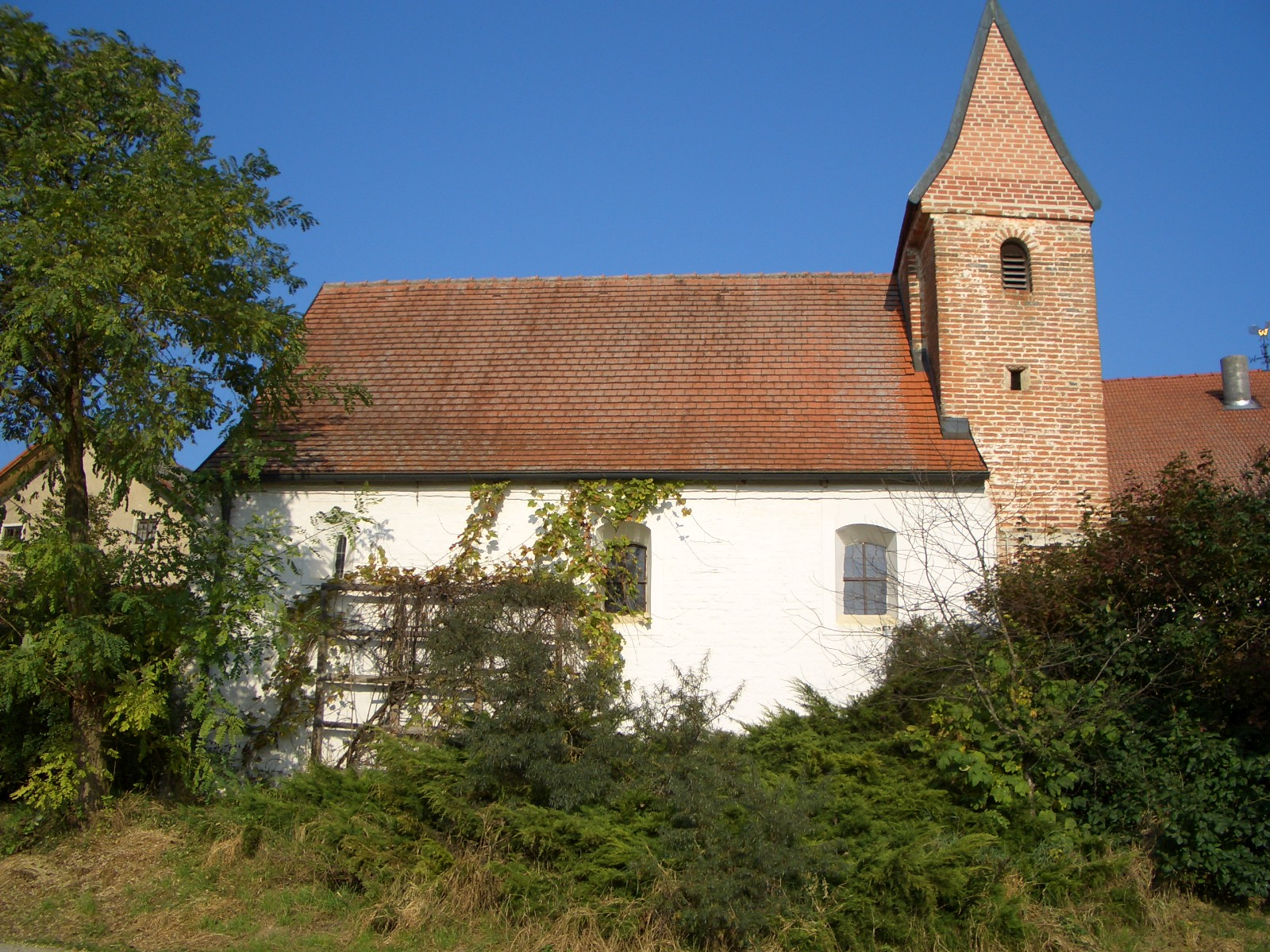 St. Vitus Rammelkam